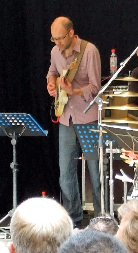 Philipp Schaufelberger in Ffm, mit dem "Big Zoom" von Lucas Niggli